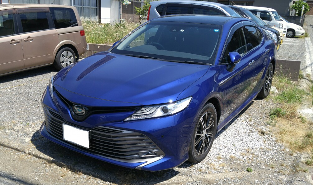 ダイハツ・アルティス